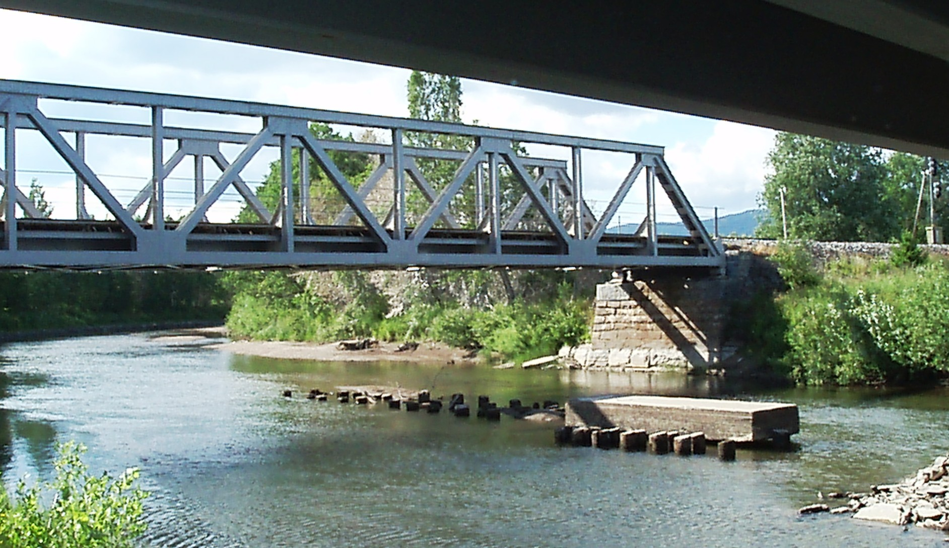 Jernbanebru over Jørstadelva, Snåsa. Brua ble sprengt av i en sabotasjeaksjon fra kompani Linge 13. januar 1945. Foran brua sees fundament for midlertidig bru etter sprengningen. Øverst i bildet: Riksveg 763-bru Jørstad river railway bridge, it was blown in a SEO attack january 13th 1945. foundation of temprary bridge from 1945 is still seen in the water